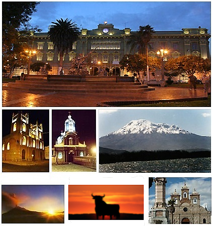 Collage de fotos de Riobamba